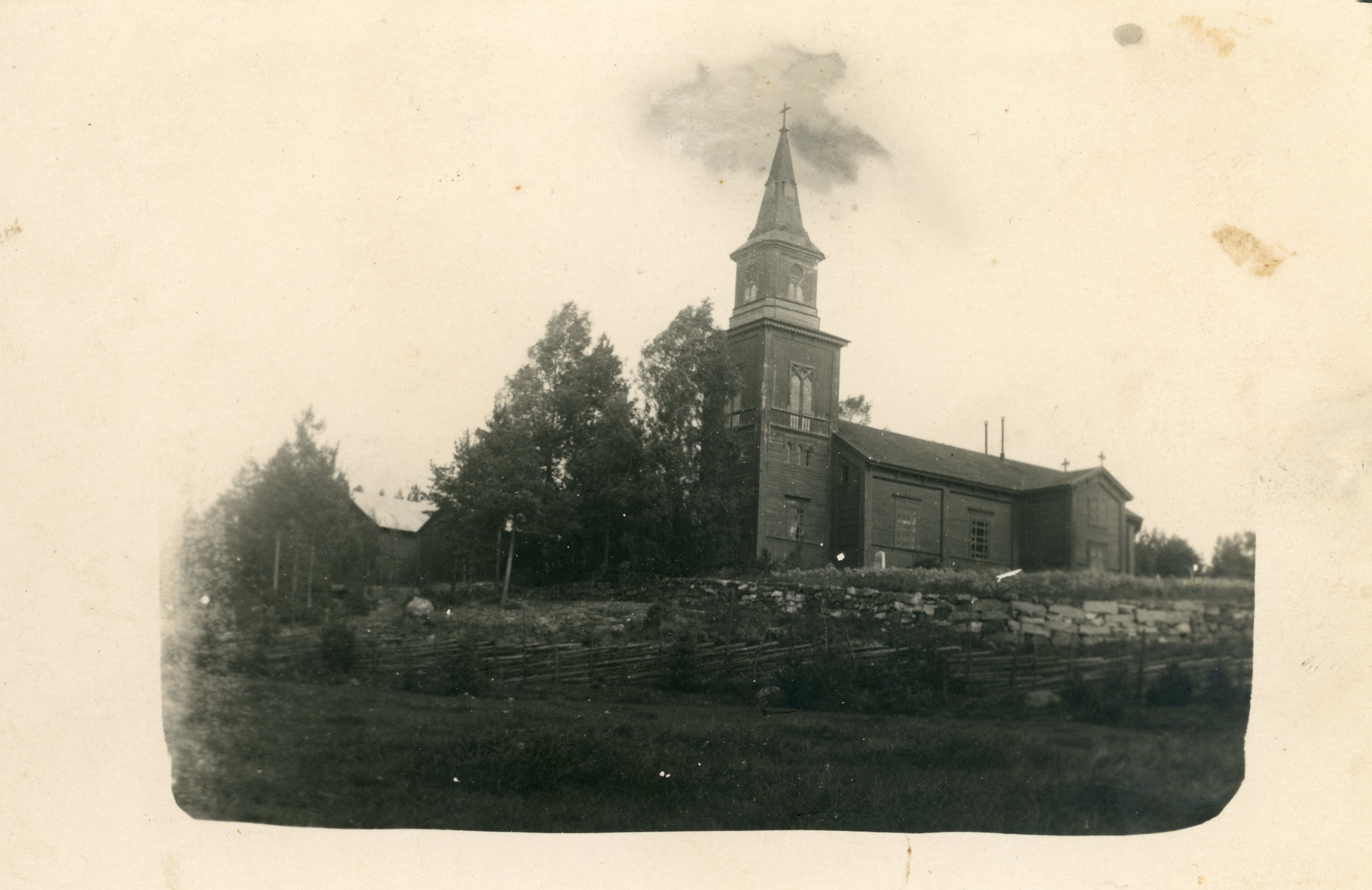 Karjalan kirkko kuvattuna noin 1900-luvun alusta